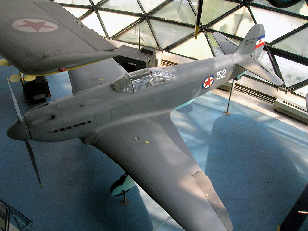 Yak-3 in Belgrade Aviation Museum.